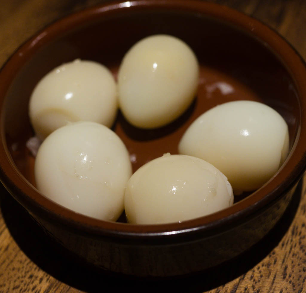 Smoked quail eggs